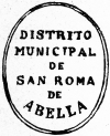 Escut antic de Sant Romà d'Abella (Isona i Conca Dellà, Pallars Jussà)